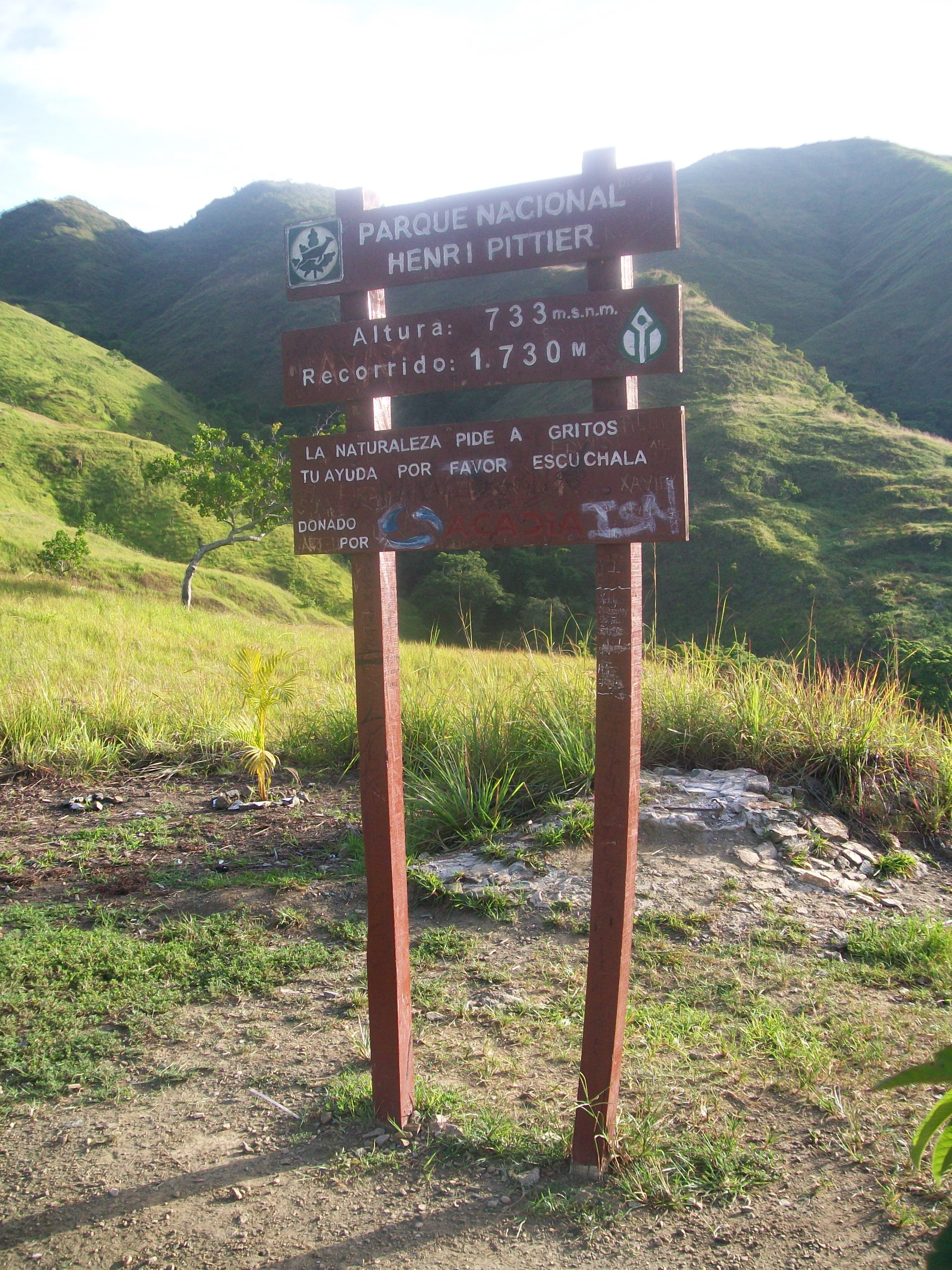 Anuncio en el Parque Nacional Henry Pittier, Maracay, Veneuzela.